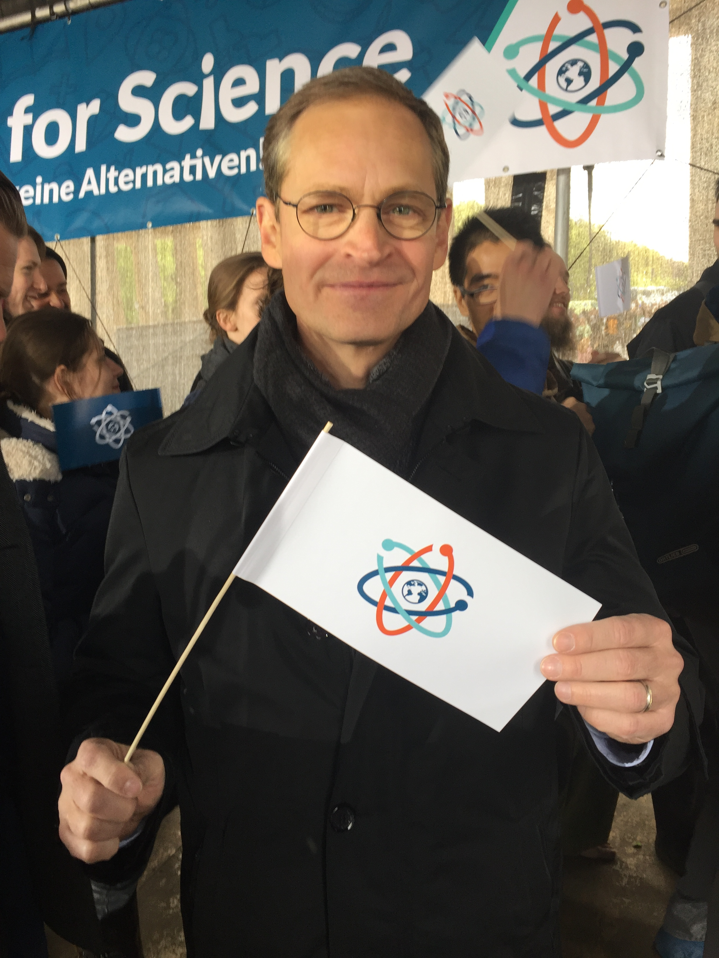 Foto: Maja Schubert, March for Science Berlin, Lizenz: CC-BY-4.0